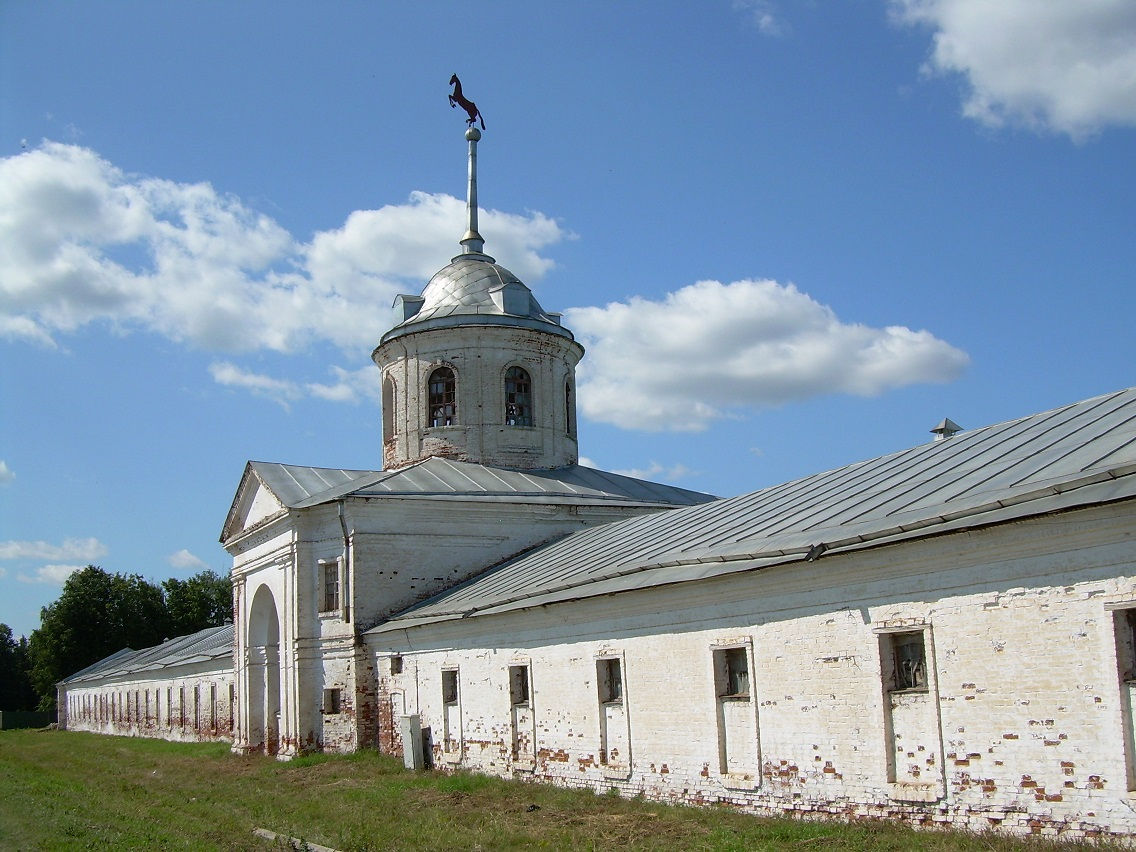 Здание конного завода в городе Гаврилов Посад